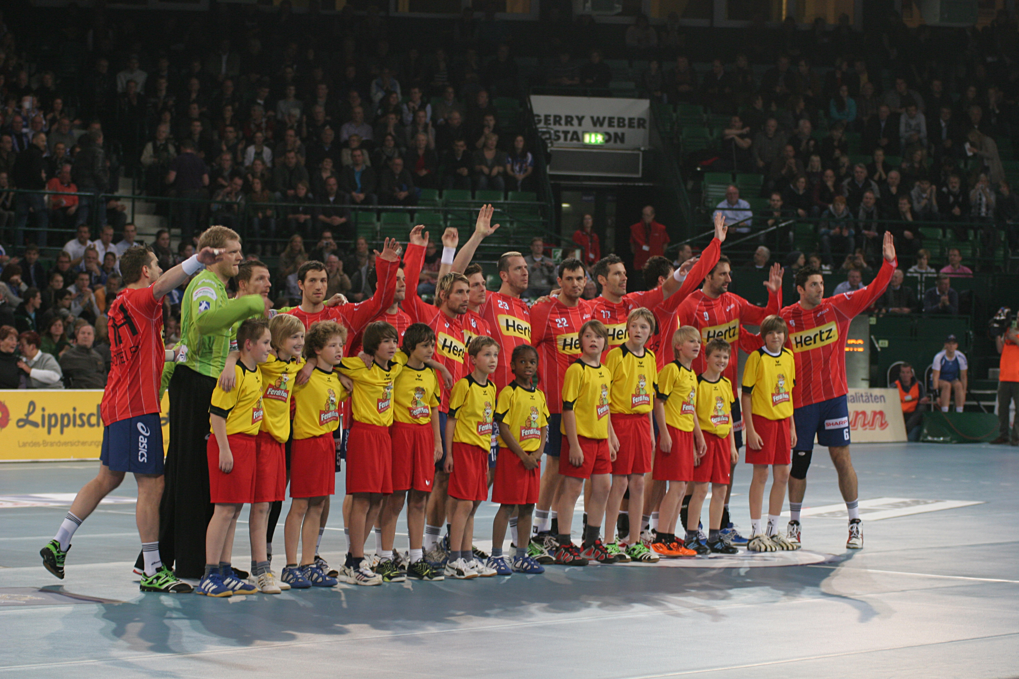 HSV Handball Mannschaftsfoto 2011 in Halle/Westf.